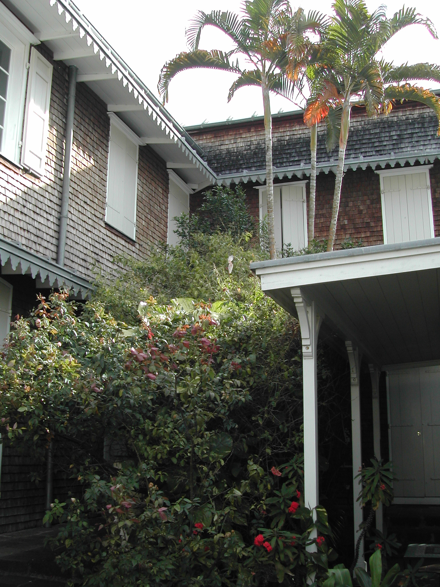 Photo de la façade arrière de la villa Déramond-Barre, à Saint-Denis de la Réunion.